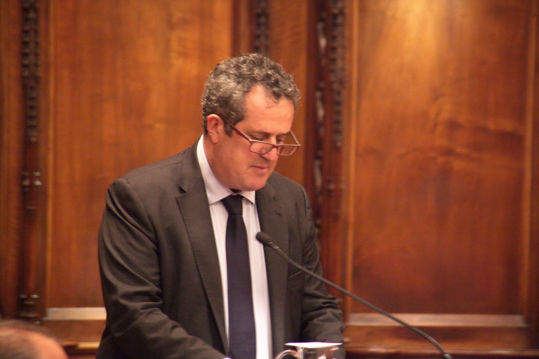 Joaquim Forn a l'Acte de lliurament a Neus Català de la medalla d'Or al Mèrit Cívic de l'Ajuntament de Barcelona. 29-10-2014